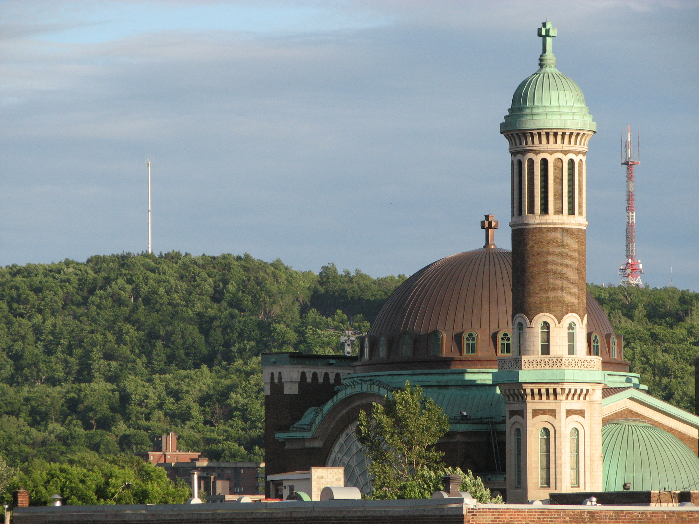 Église St. Michael à Mile End, Montréal